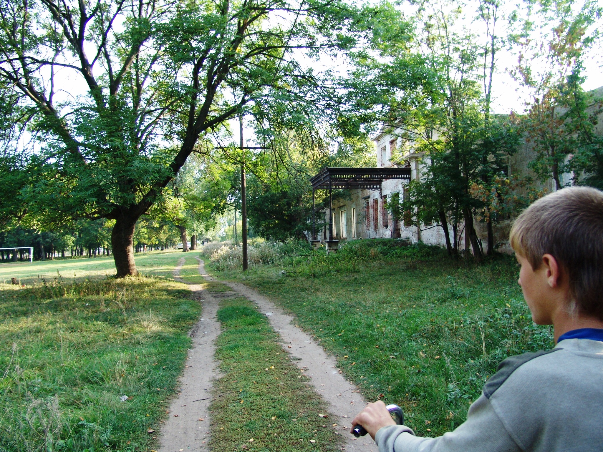 Усолье,в графской усадьбе. В роли экскурсовода Александр Кузнецов, студент 1-го курса Усольского сельскохозяйственного техникума